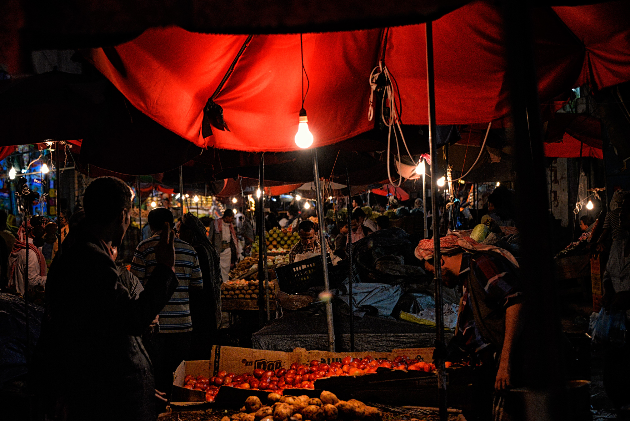 Night Market, Hodaidah, Yemen